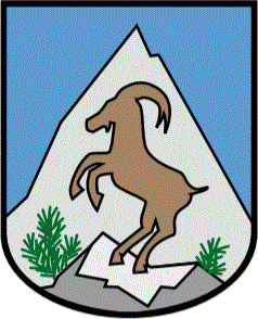 Wappen der Gemeinde Mittelberg (Vorarlberg) in Österreich: „Ein blauer Schild, aus dessen Grunde sich ein Felsen erhebt, auf dem ein aufgerichteter, natürlicher Steinbock steht; hinter dem Felsen ist ein hoher, spitz zusammenlaufender grüner Bergkegel zu sehen. Felsen und Bergkegel sind mit Legföhren bewachsen. Den Schild umgibt eine bronzefarbene ornamentierte Randeinfassung.“Dieses Wappen verwendet die Gemeinde offiziell, man beachte, dass die Blasonierung nicht präzise wiedergegeben ist